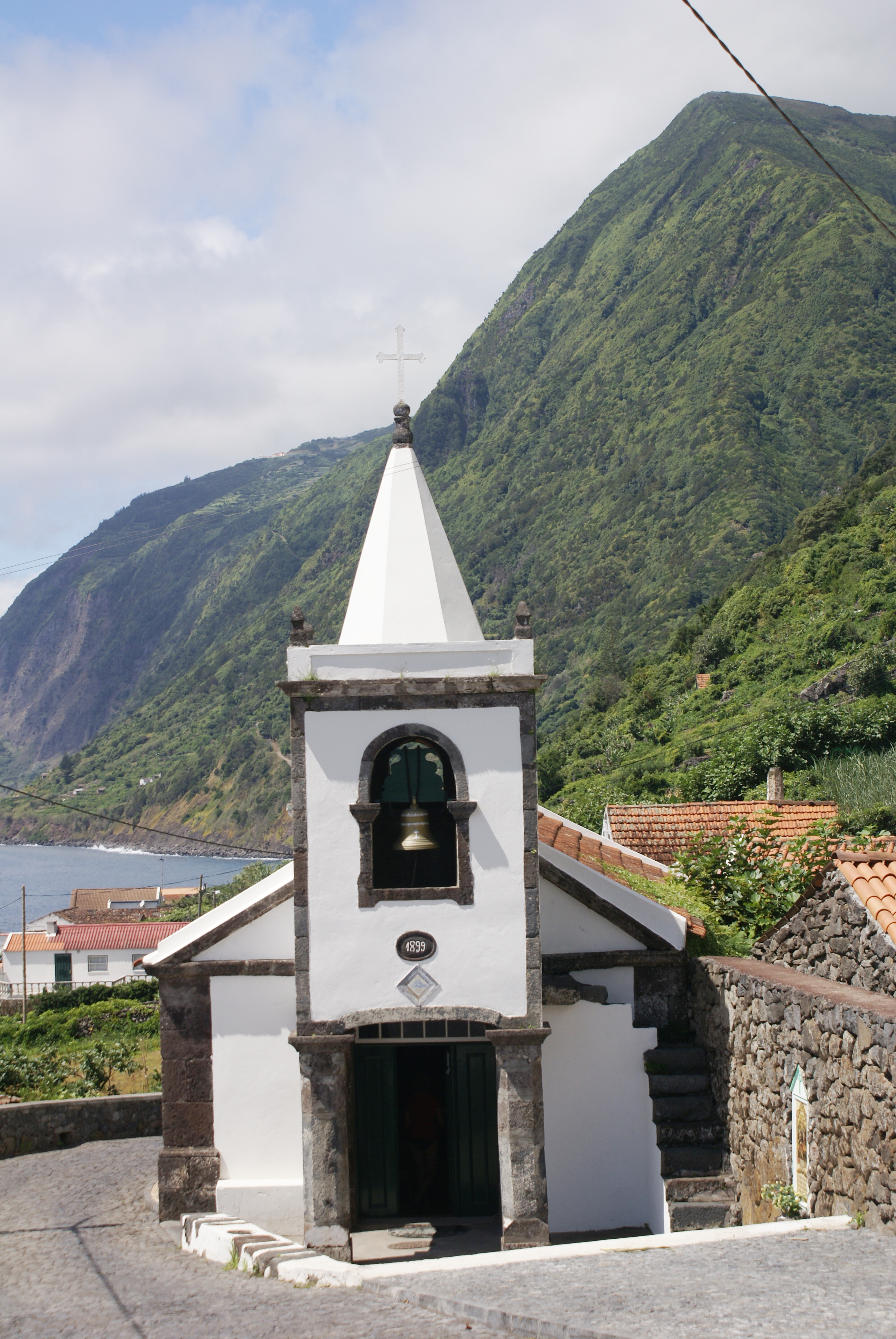 Fajã de São João, Ermida de São João, fachada, Calheta, ilha de São Jorge, Açores